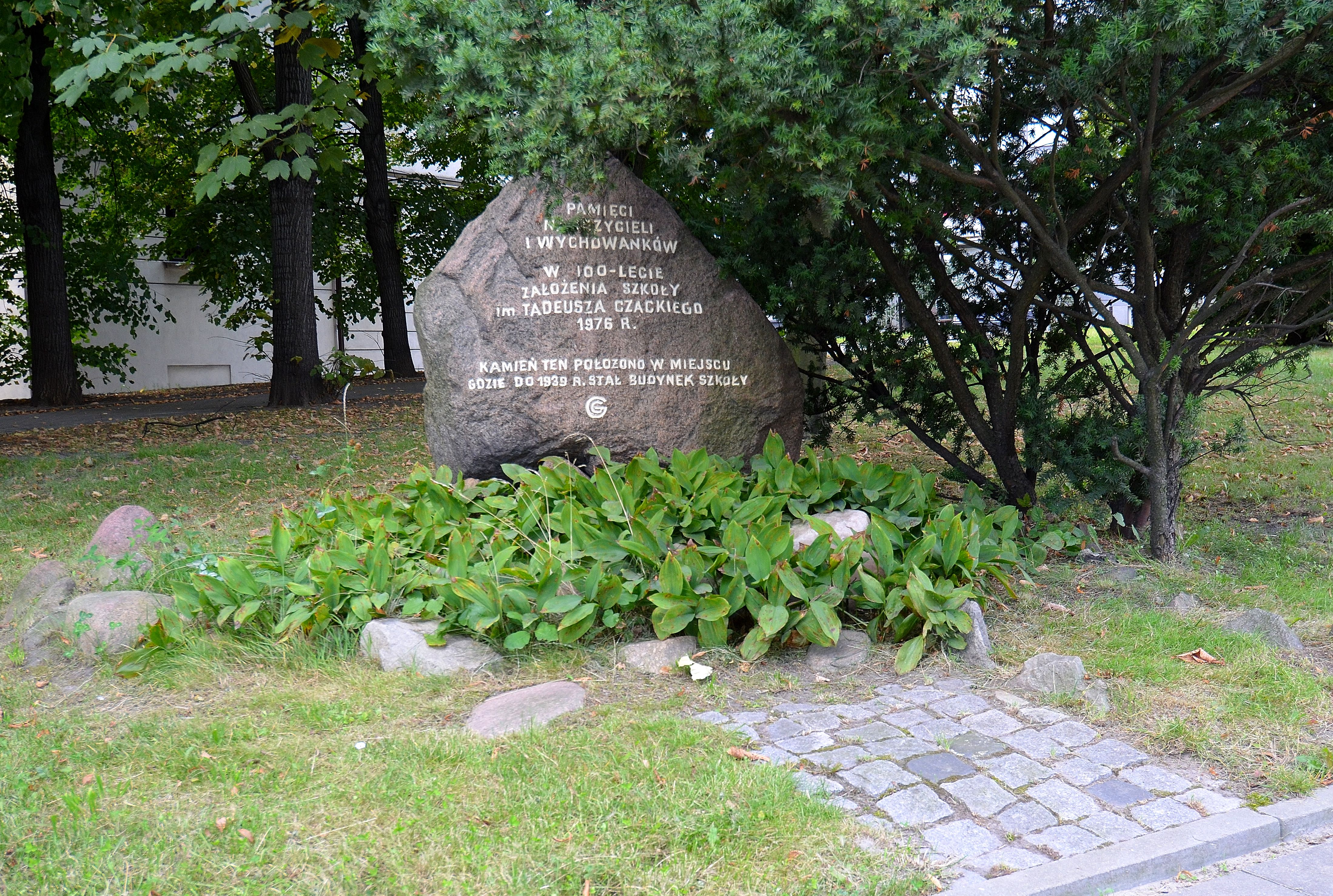 Kamień pamiątkowy przy al. Solidarności upamiętniający Liceum im. Tadeusza Czackiego